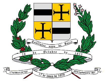 Escudo del municipio Sucre. Estado Miranda. Venezuela